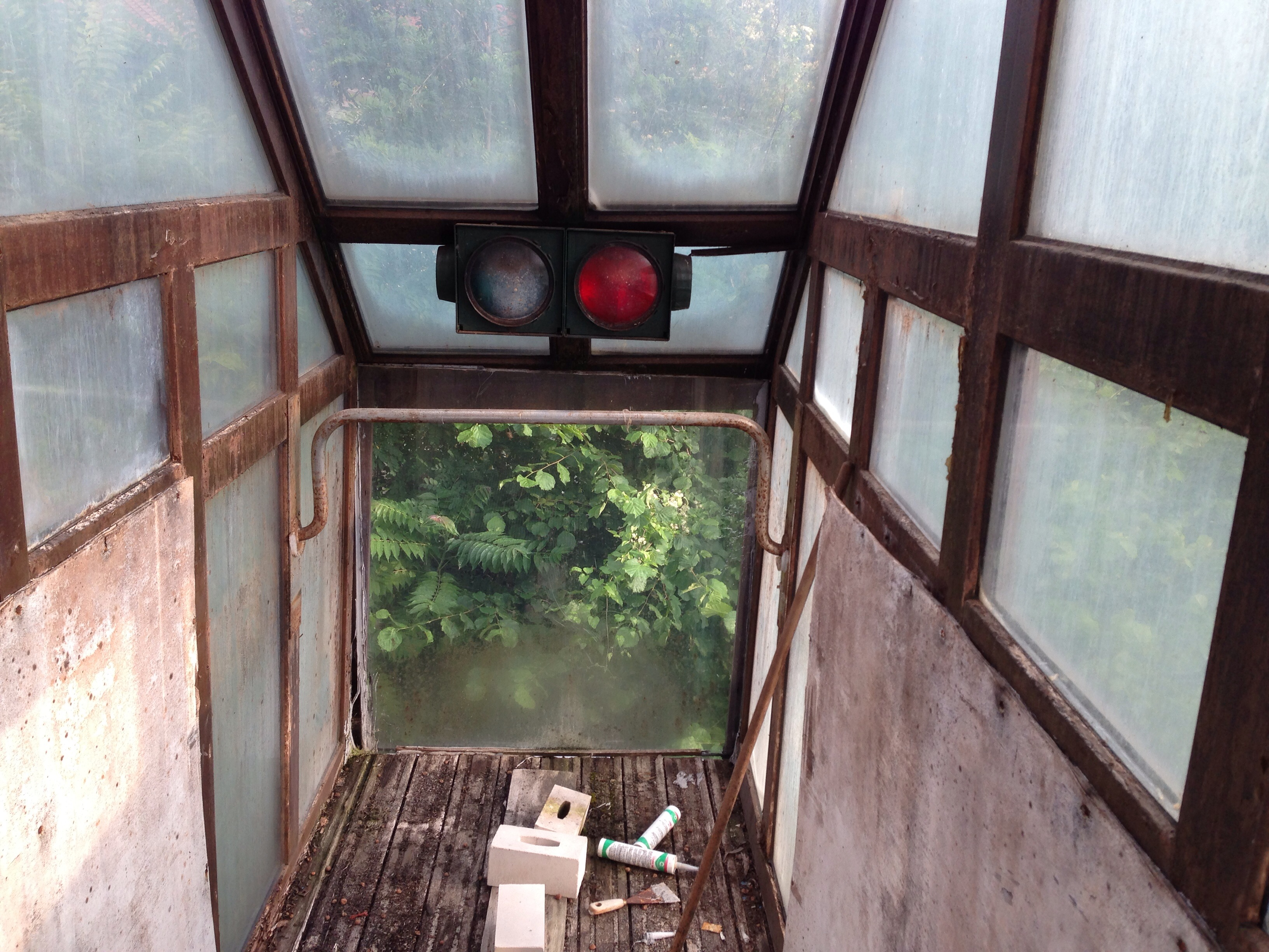 Berliner Luft- und Badeparadies im Jahr 2013